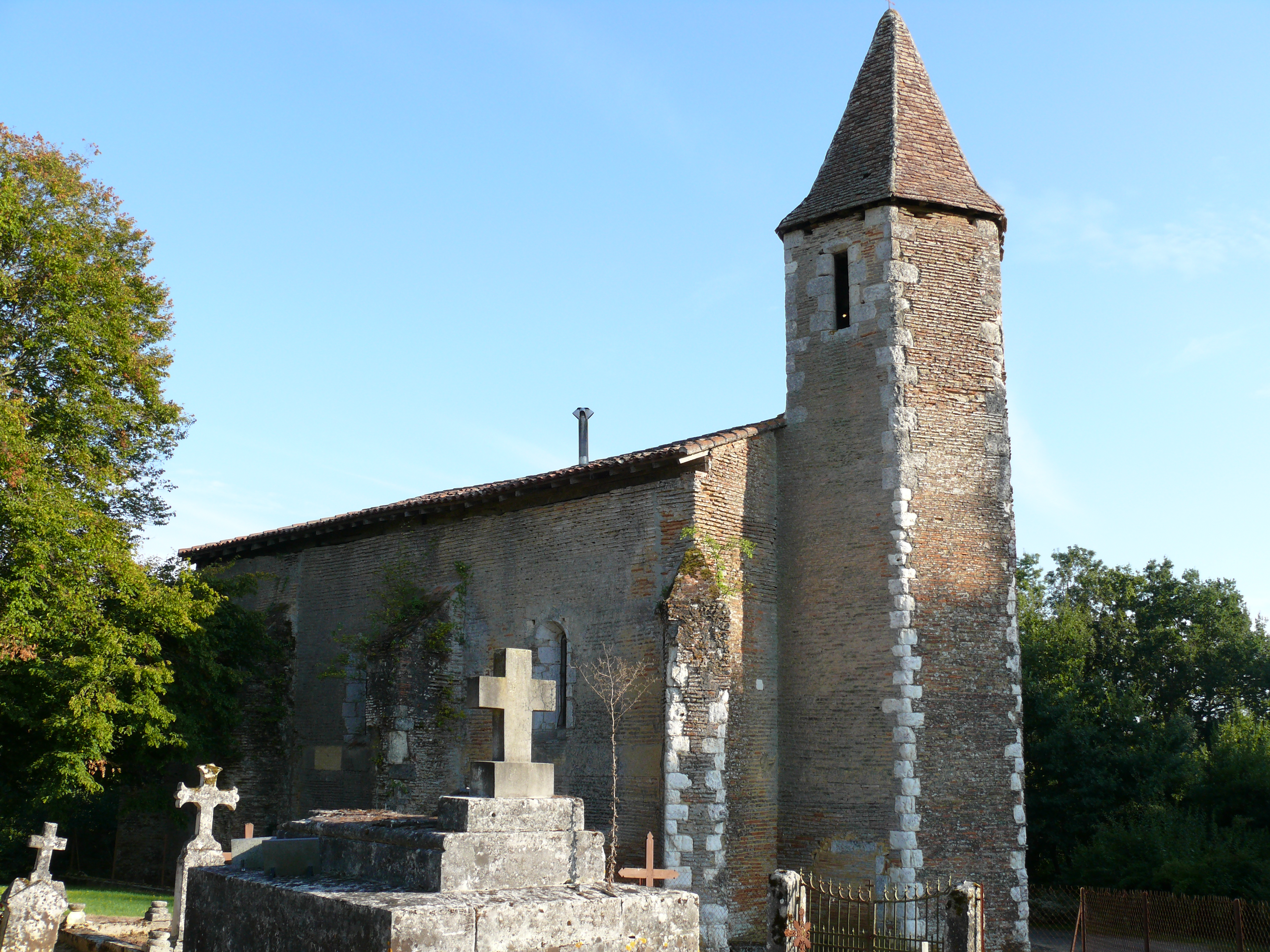 Parleboscq - Eglise de Sarran et cimetière